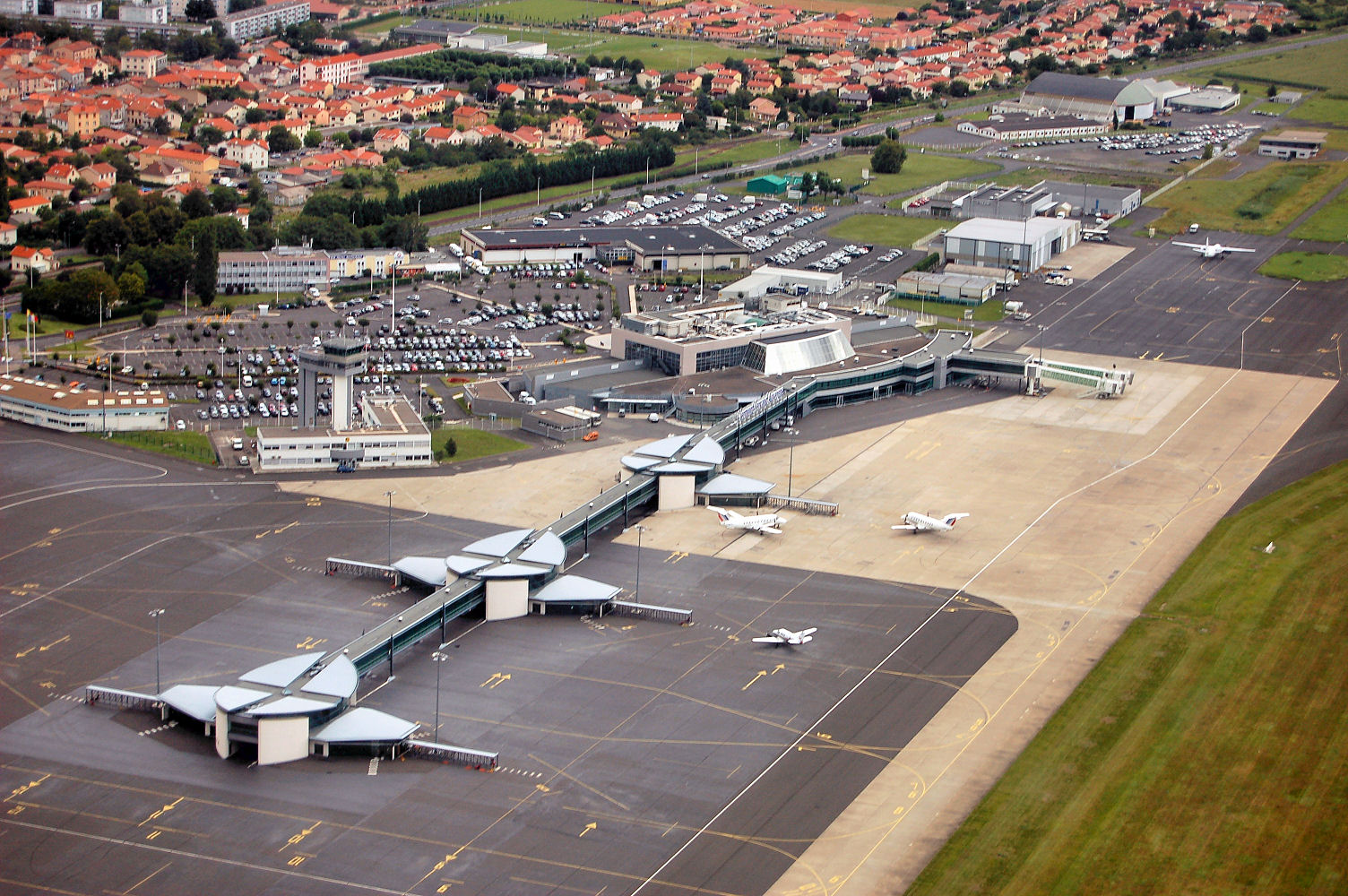 Aéroport de Clermont-Ferrand Auvergne (Aulnat, prés de Clermont-Ferrand, France)